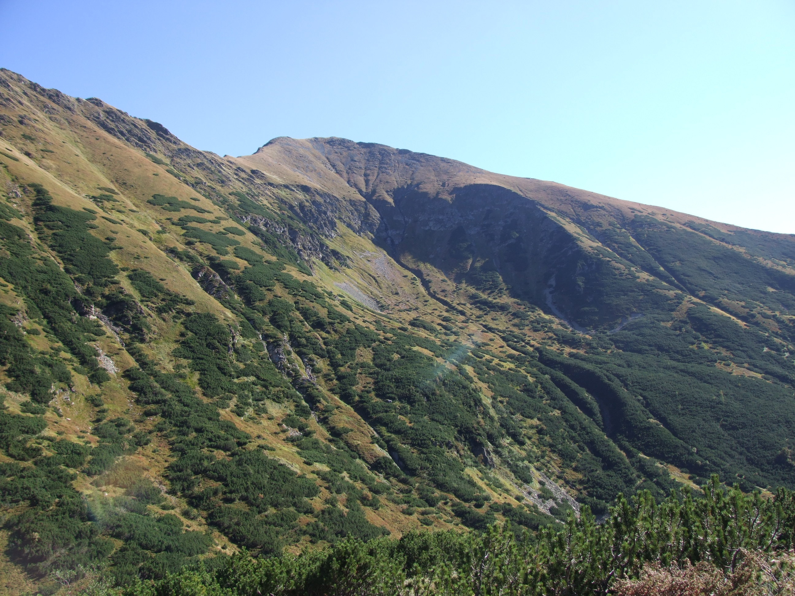 Baraniec z kotłem lodowcowym Kotlina. widok z Doliny Żarskiej